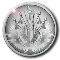 Insigne métallique du wikipédia:Commissariat de l'armée de terre